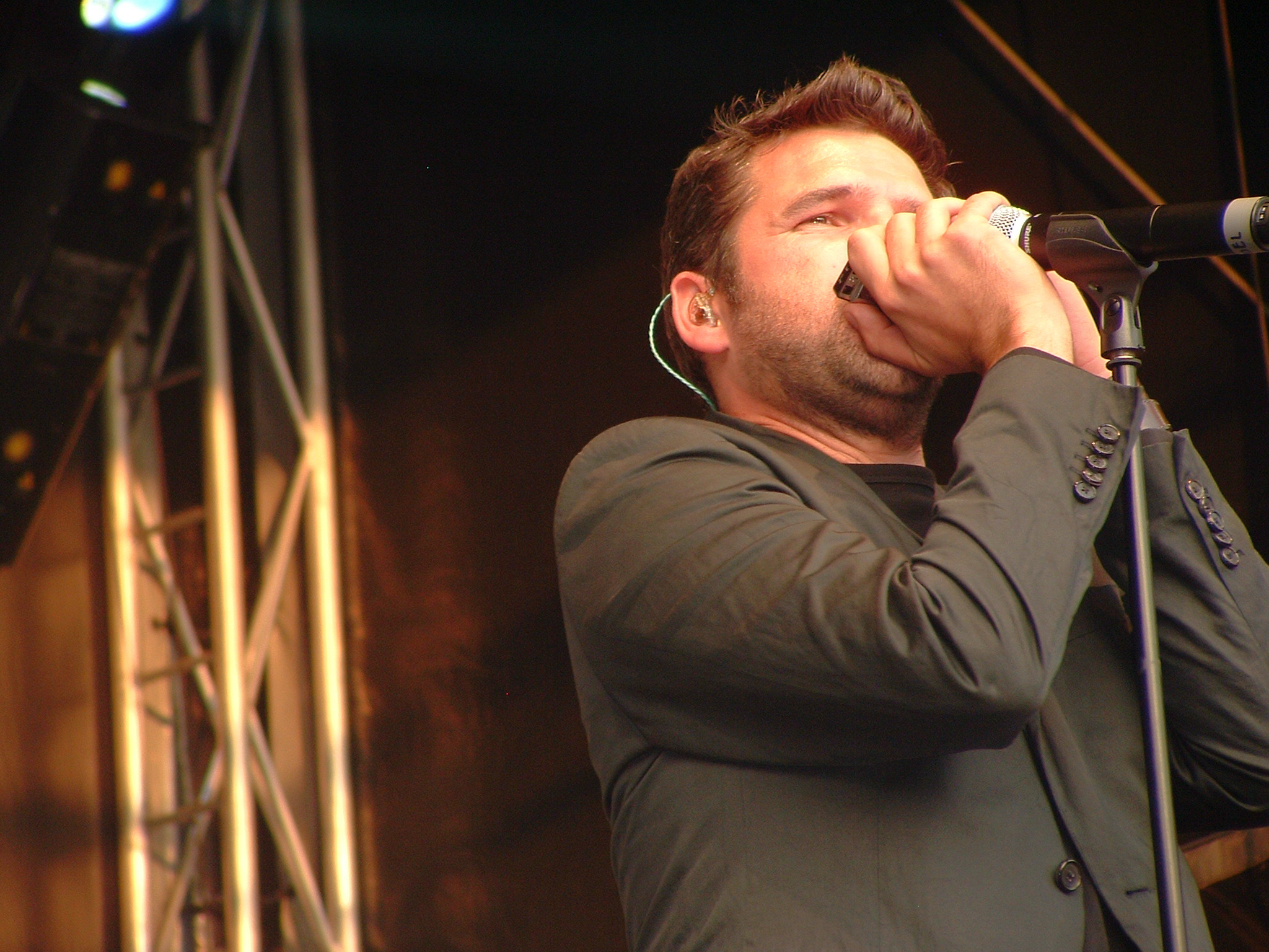 Roel Vanderstukken tijdens een optreden op Flikkendag 2008.